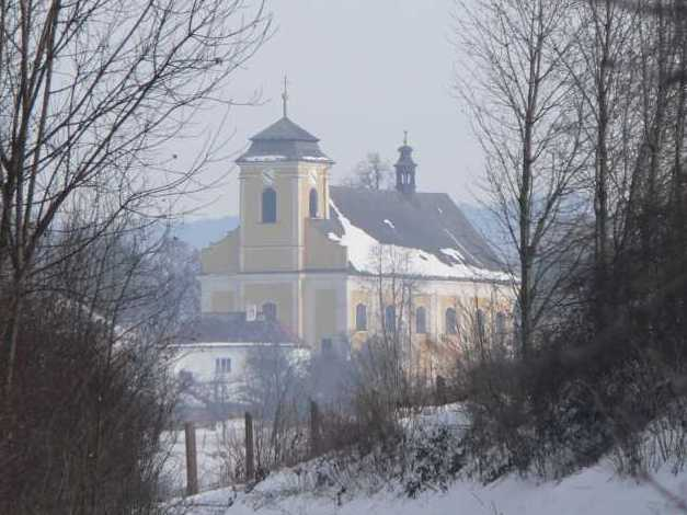 Kostel svatého Vavřince (Nová Hradečná)